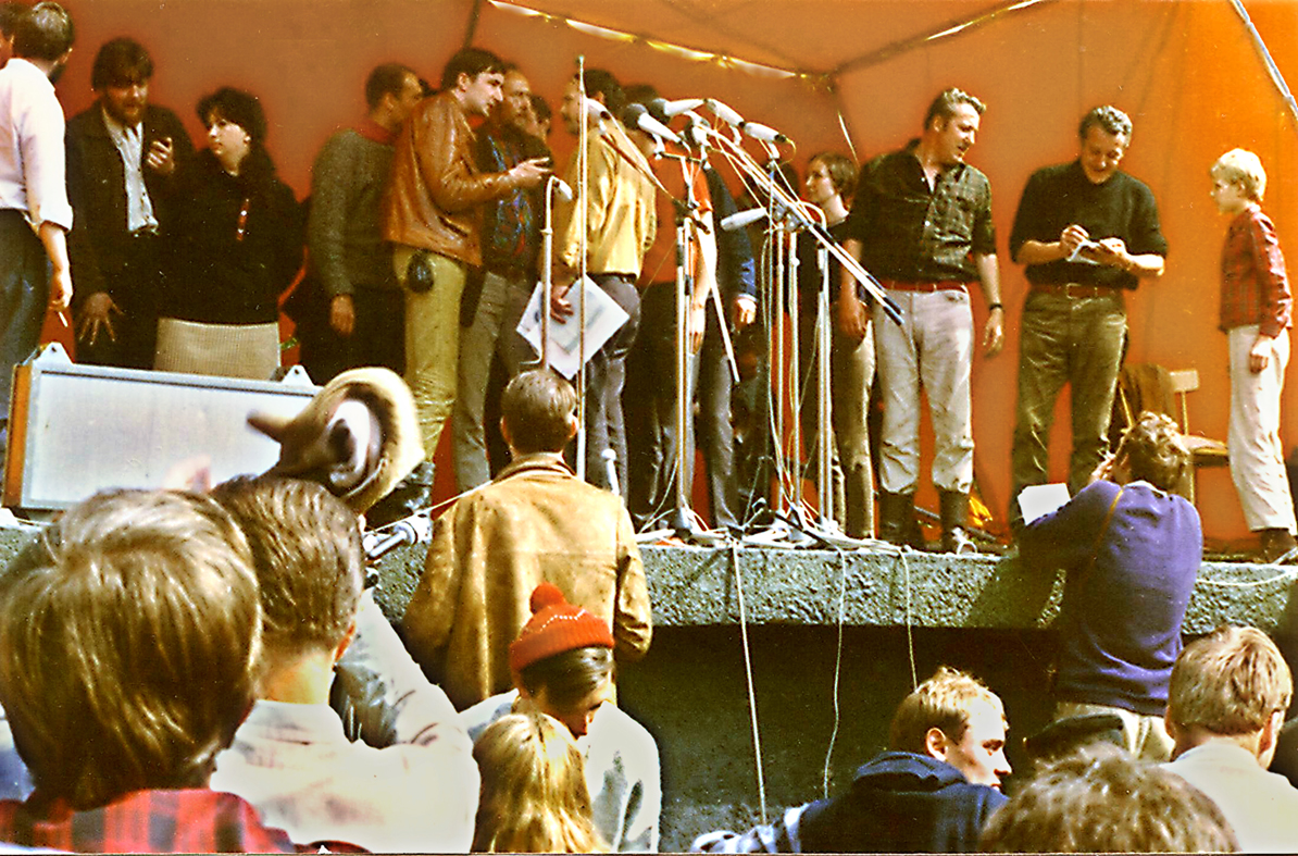 Chaotische Szene auf der Bühne während des Burg Waldeck Festivals 1968